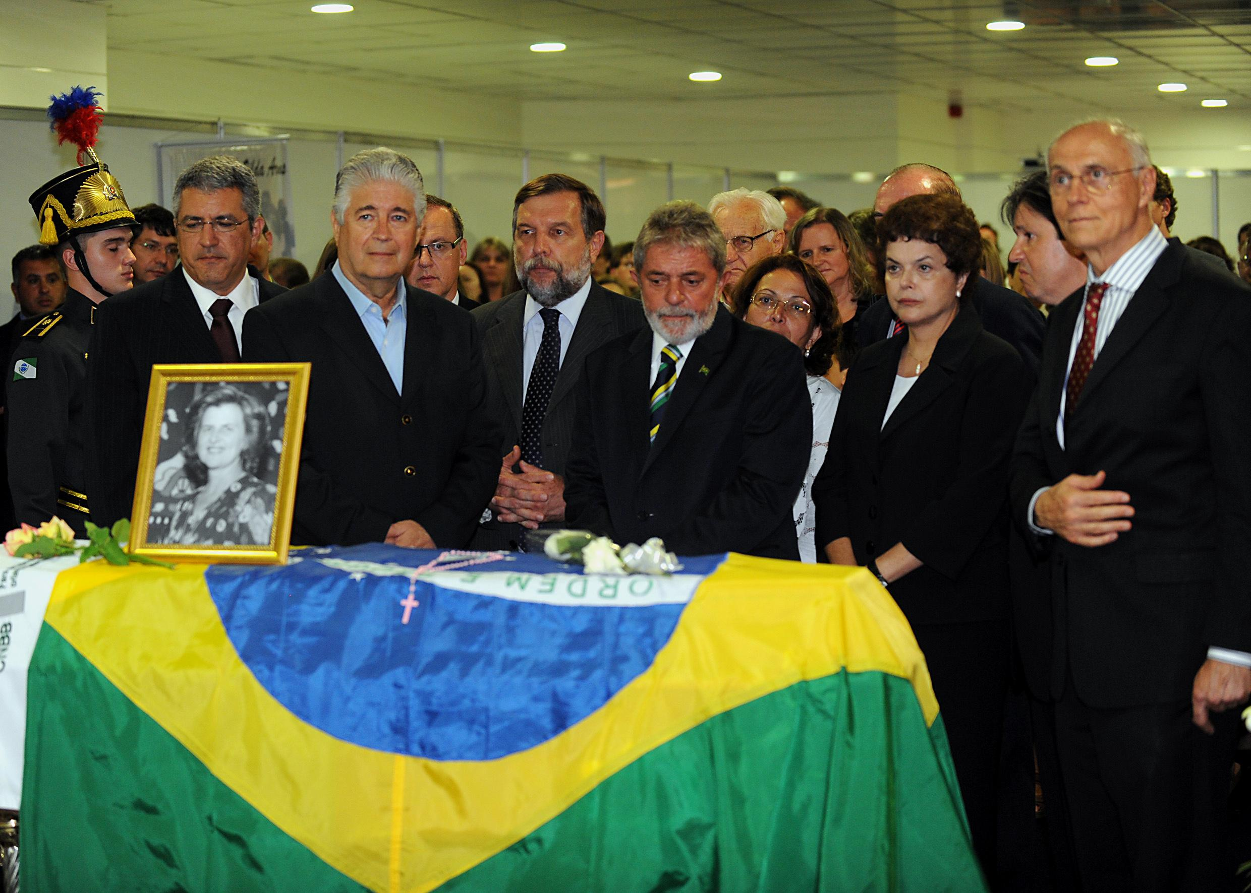 Curitiba - Presidente Luiz Inácio Lula da Silva comparece ao velório da coordenadora da Pastoral da Criança, Zilda Arns no Palácio das Araucárias Foto: Fabio Rodrigues Pozzebom/ABr Também presentes: Roberto Requião, Flávio Arns, Dilma Rousseff e Eduardo Suplicy